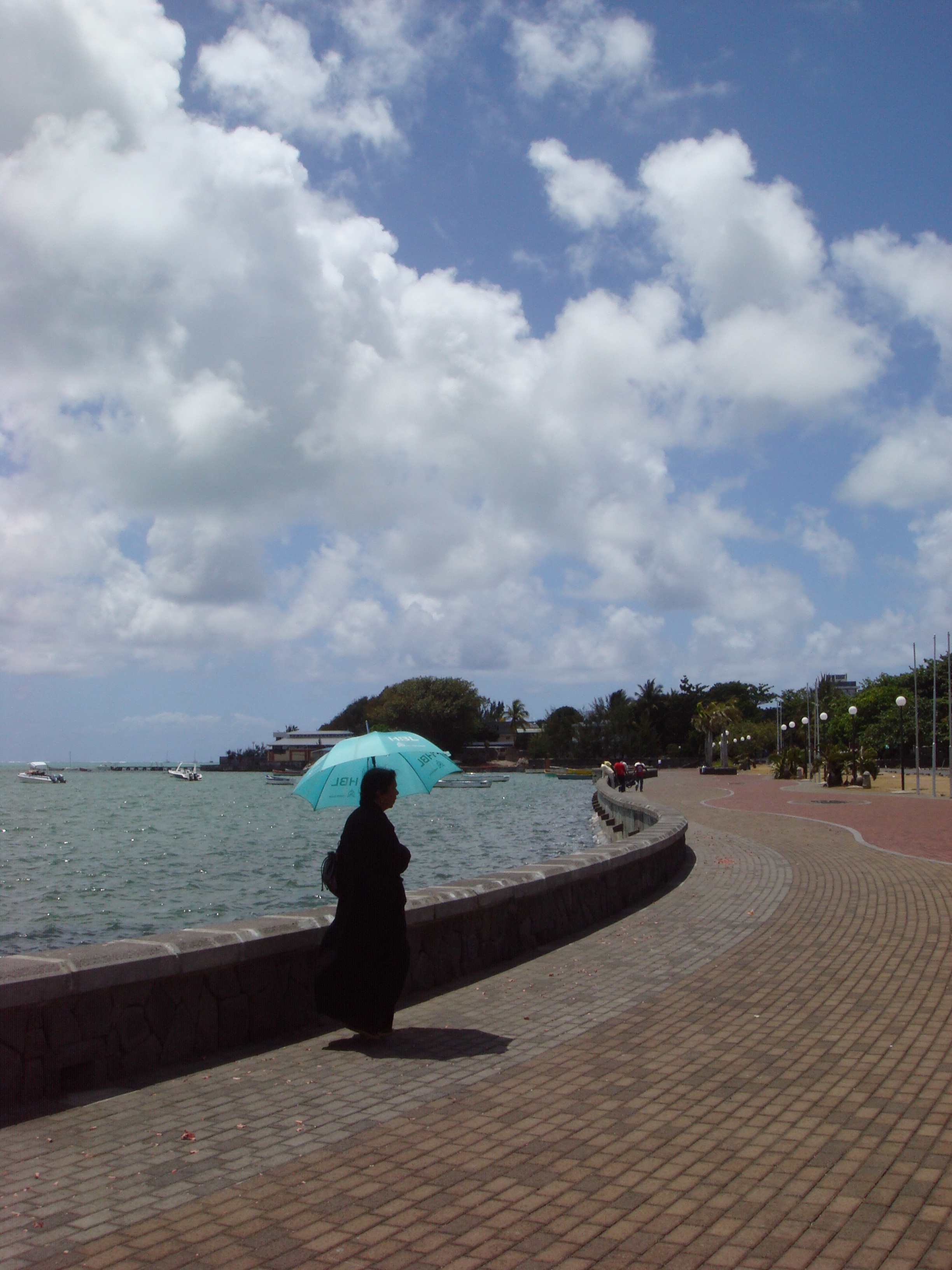 Набережная города Махеборг